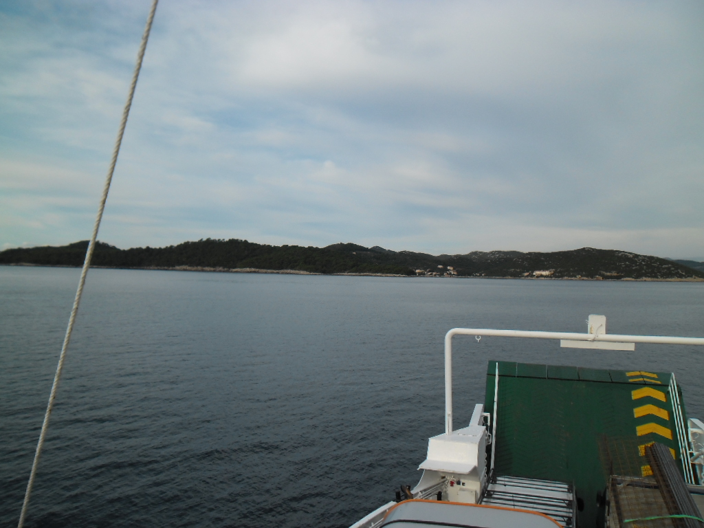 približavanje otoku Šipanu